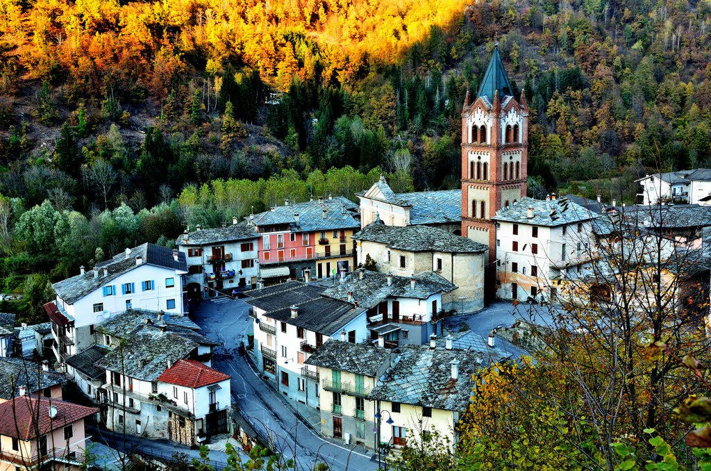 Vista di Melle